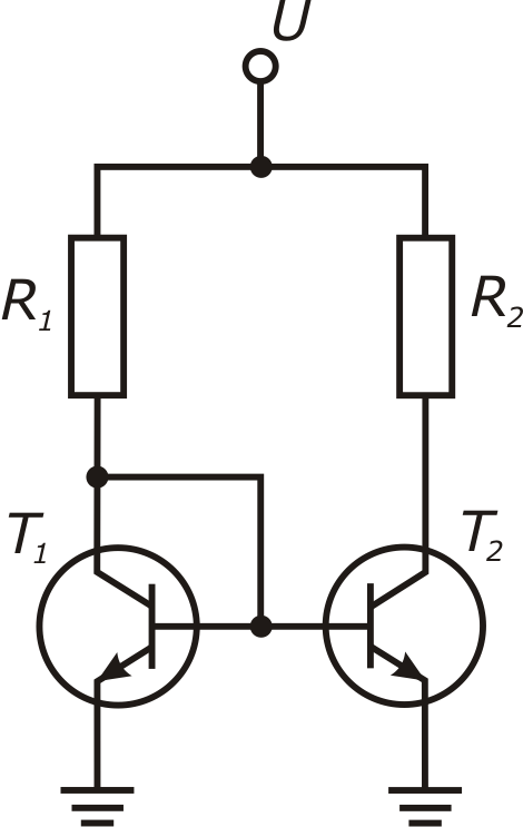 Рисунок 2 — Генератор тока типа токовое зеркало, собранный на биполярных транзисторах.